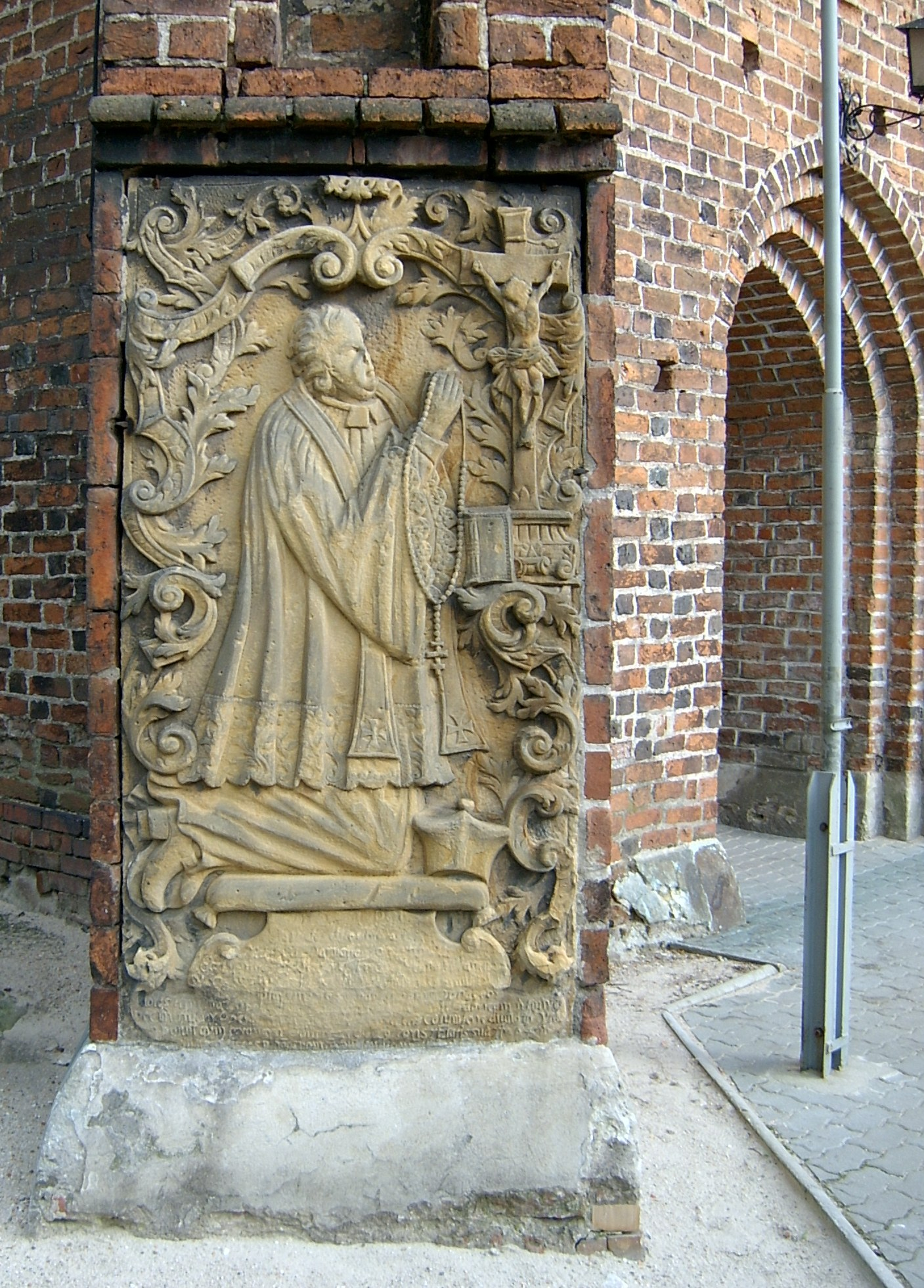 Grabmal für den Pfarrer Matthäus Damian Schmidt in Święciechowa. Die Inschrift lautet übersetzt aus dem Lateinischen: Dem allmächtigen großen Gott zur Ehre, zum frommen Gedächtnis. Stehe still, Wanderer und lies! Hier liegt Matthäus Damian Schmidt, 28 Jahre Leiter dieser Kirche und ihr Erbauer, Dekan des Dekanates Frauenstadt, geboren im Jahre 1673, ein wahrhaft apostolischer Mann, wie Schwetzkau sich einen ähnlichen wird mehr wünschen als haben können. Über seine vorzüglichen Geistesgaben und Verdienste will ich schweigen, aber der Stein hier an der Mauer wird sie verkünden. Den Kirchbau hat er zwar nicht vollendet, aber Urheber eines unvollendeten Werkes ist er nicht gewesen. Ungeduldig über den Verzug vermochte der Himmel es nicht länger zu ertragen einen solchen Mann nicht zu krönen. Er starb am 29. September 1736 im Alter von 64. Jahren.